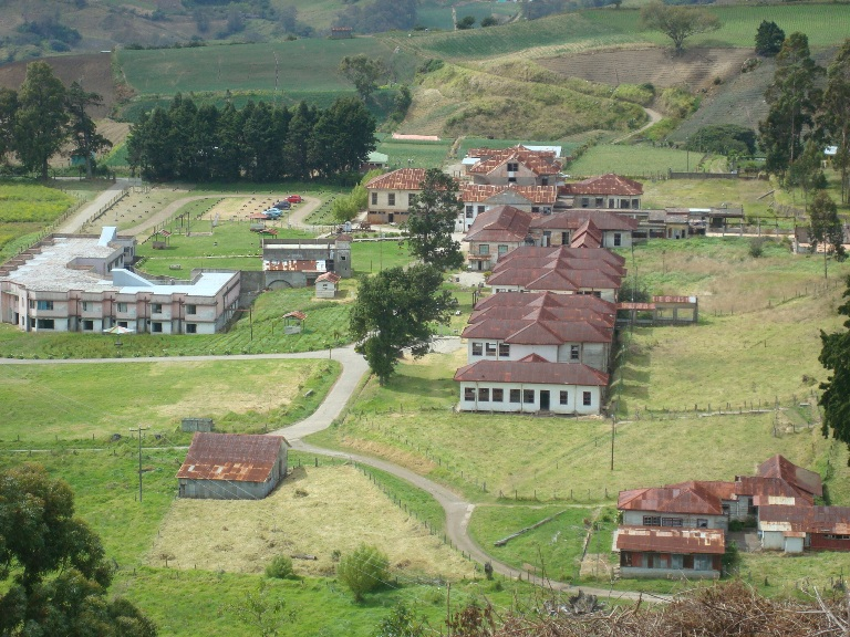 Vista panorámica del Sanatorio Durán, antiguo hospital de tuberculosos, localizado en la Prusia de Cartago, Costa Rica.